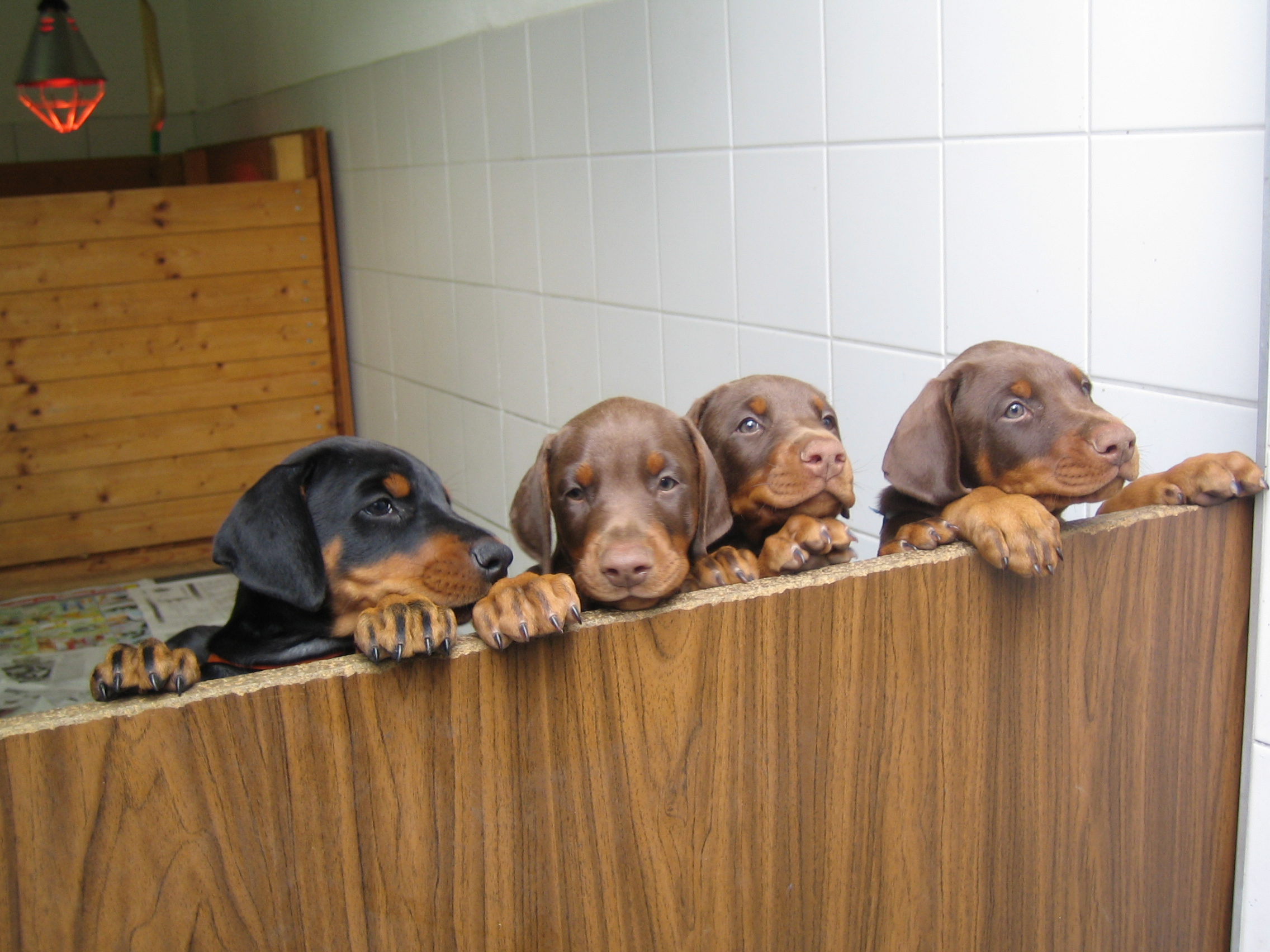 Dobermannwurf im Zwinger von Nemesis, 6 Wochen alt